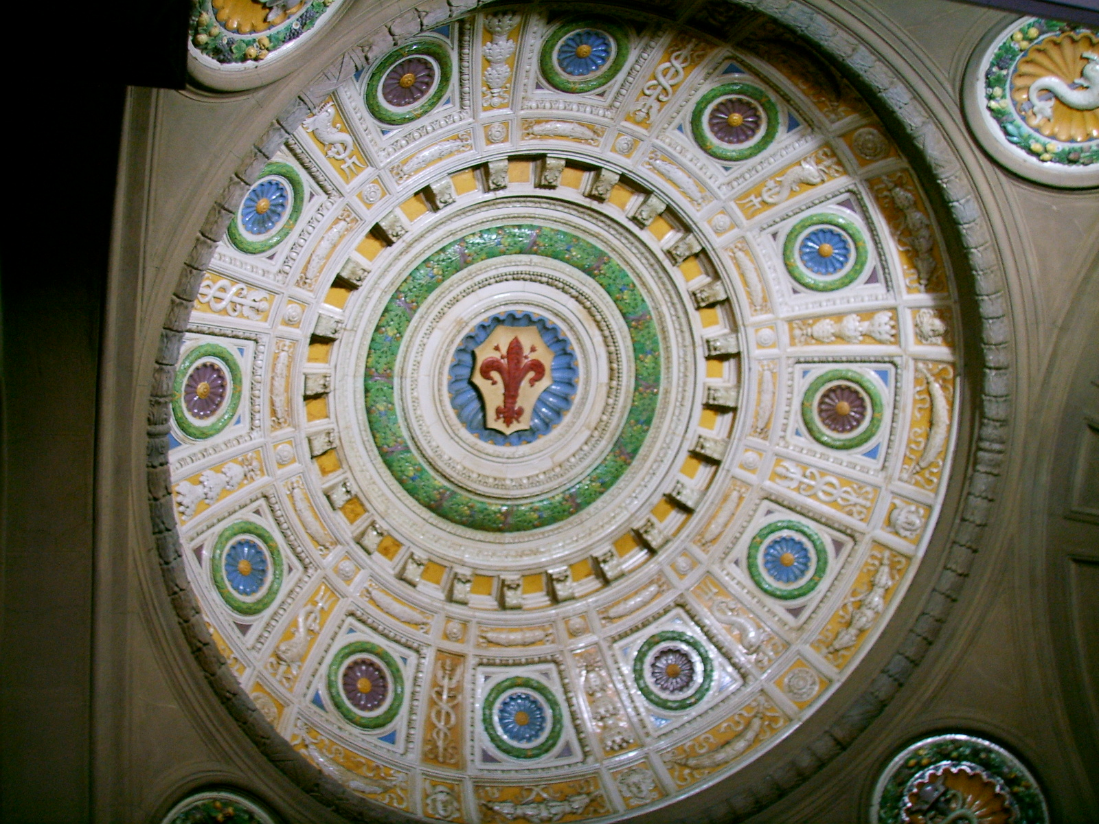 Palazzo delle poste (Firenze), cupoletta